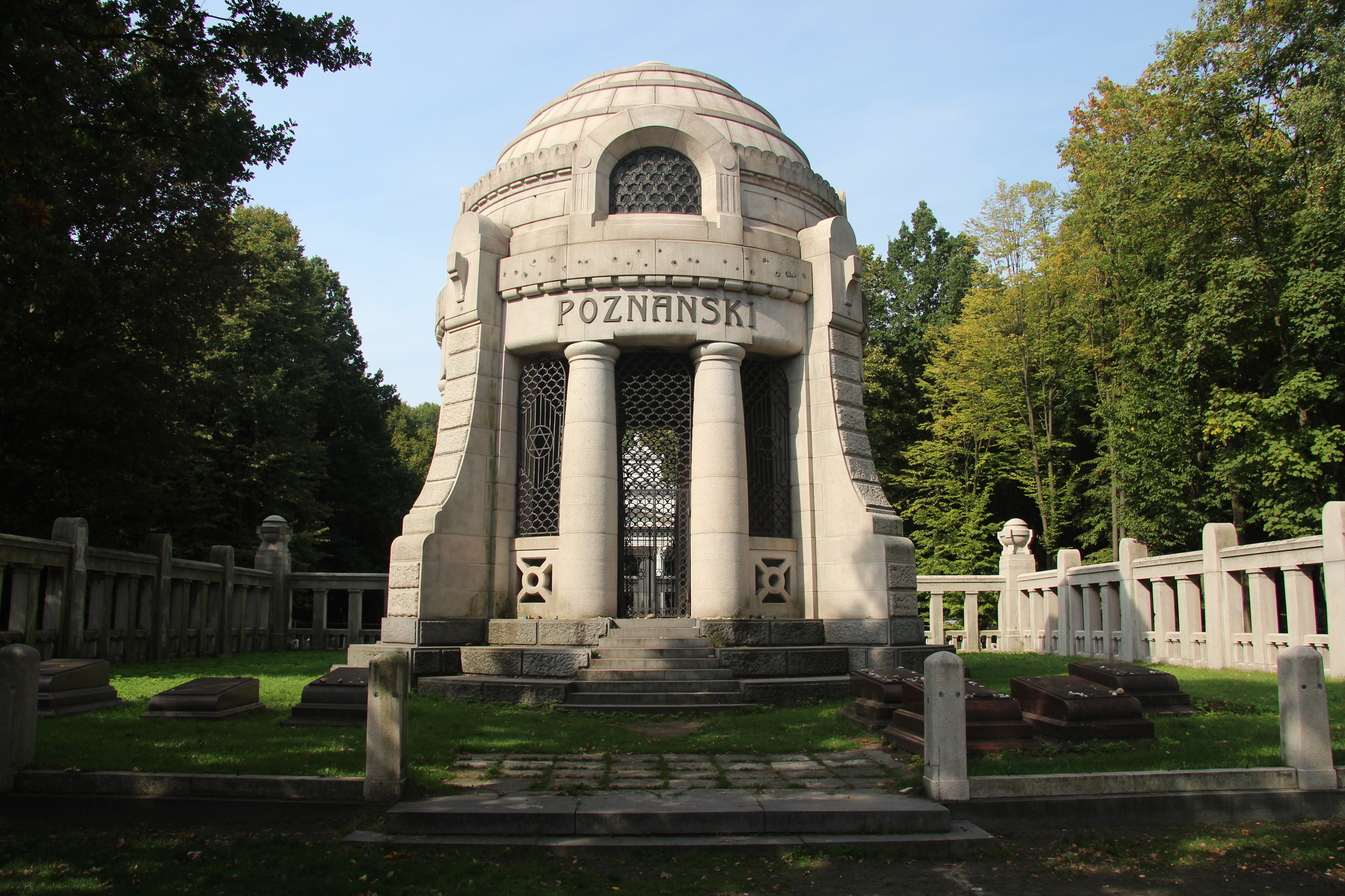 Izrael Poznański's Mausoleum en de graven daaromheen op de Joodse begraafplaats van Lodz in Polen.